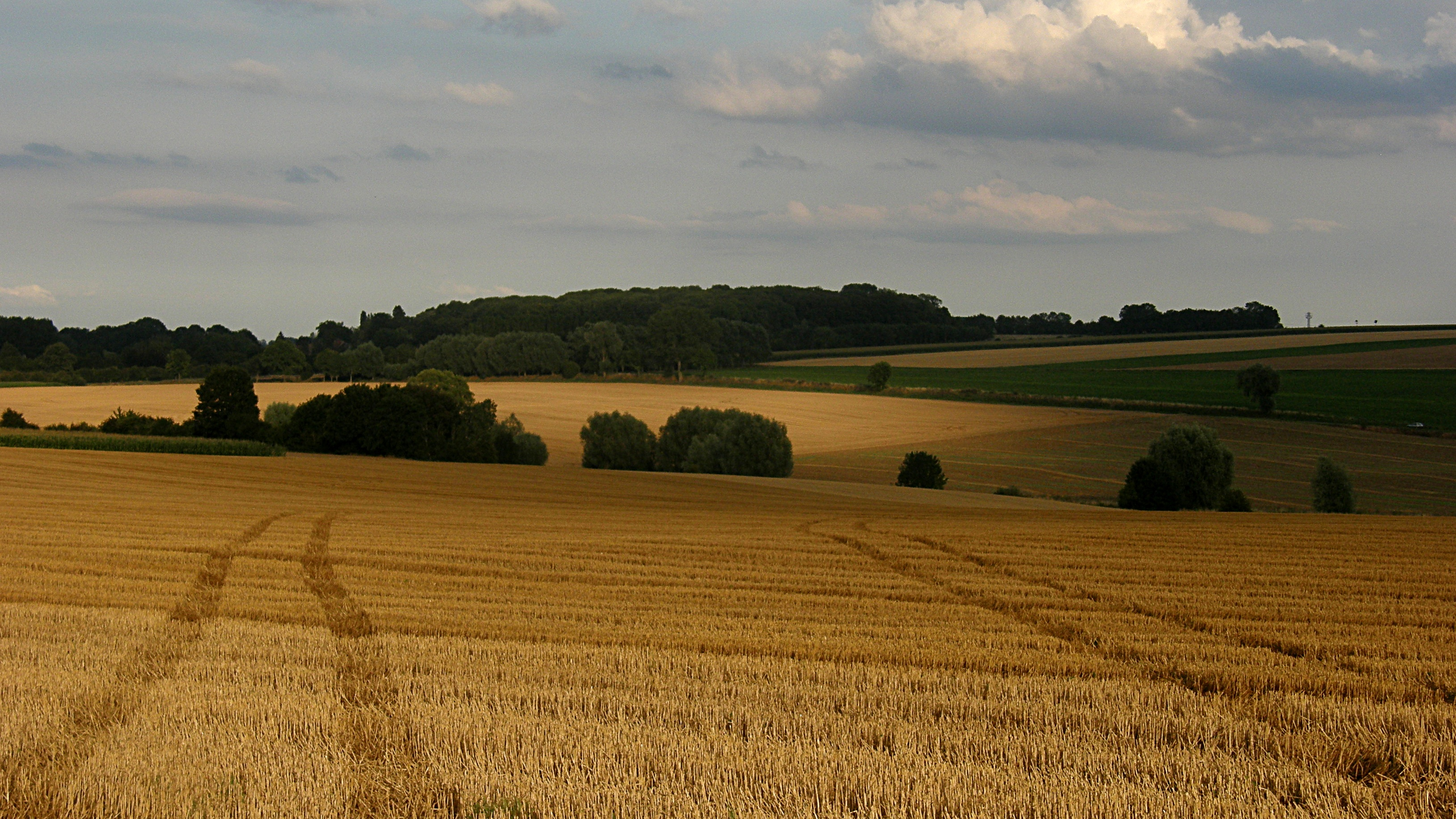 Rivière (Pas-de-Calais, France). Campagne environnante.